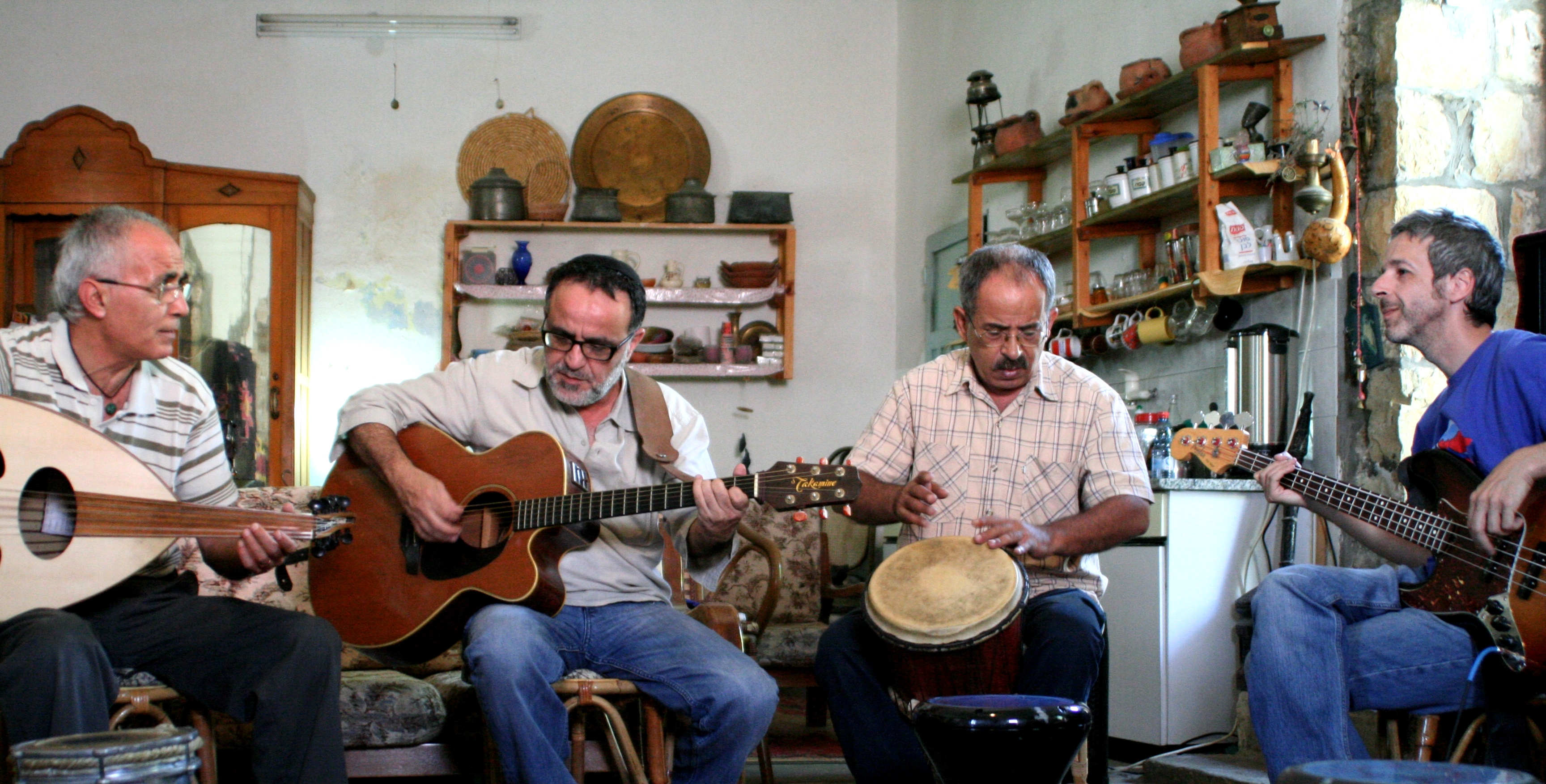 הרכב ג'יש כולל את: ג`ורג` סמעאן: עוד וכנור ושירה סאלם דארוויש: כלי הקשה ושירה אהוד בנאי: גיטרות מפוחית ושירה גילי סמטנה: גיטרה בס